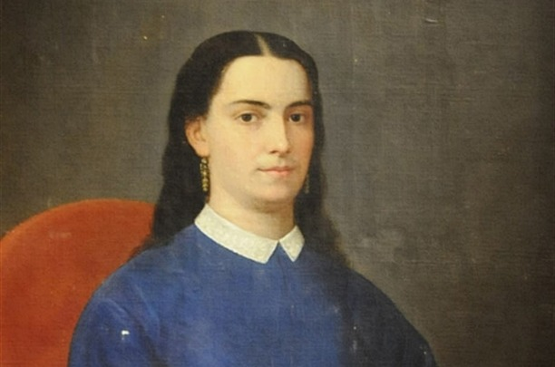 Personaje Ilustre para la independencia de Quito- Ecuador